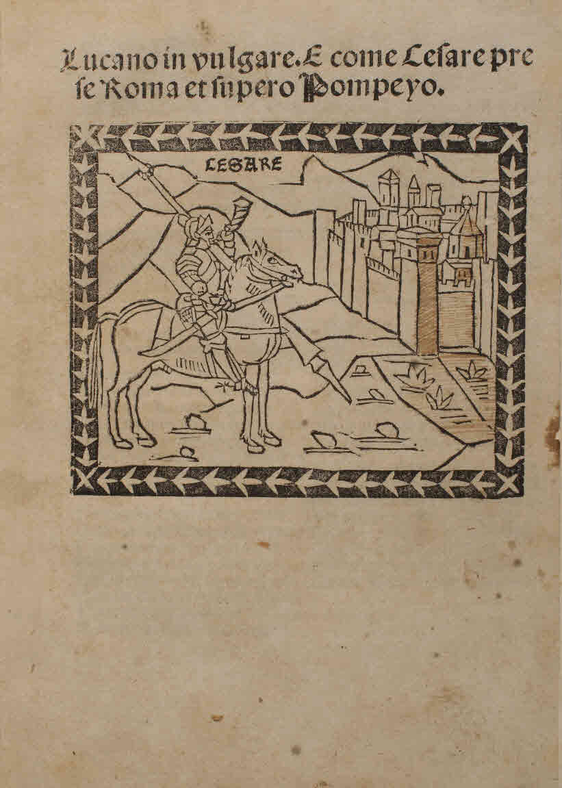 Pharsalia (italiano). - Stampato in Bologna : [Bazaliero Bazalieri], [circa 1493]. - 42 c. ; a⁶, b4, c⁸, d-i⁴ ; 4º. - Marca tipografica nell'explicit .